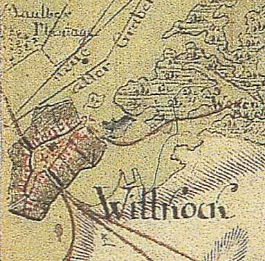 Wietstock, Ludwigsfelde, Brandenburg, Deutschland, Schmettau'sche Karte von 1767-87